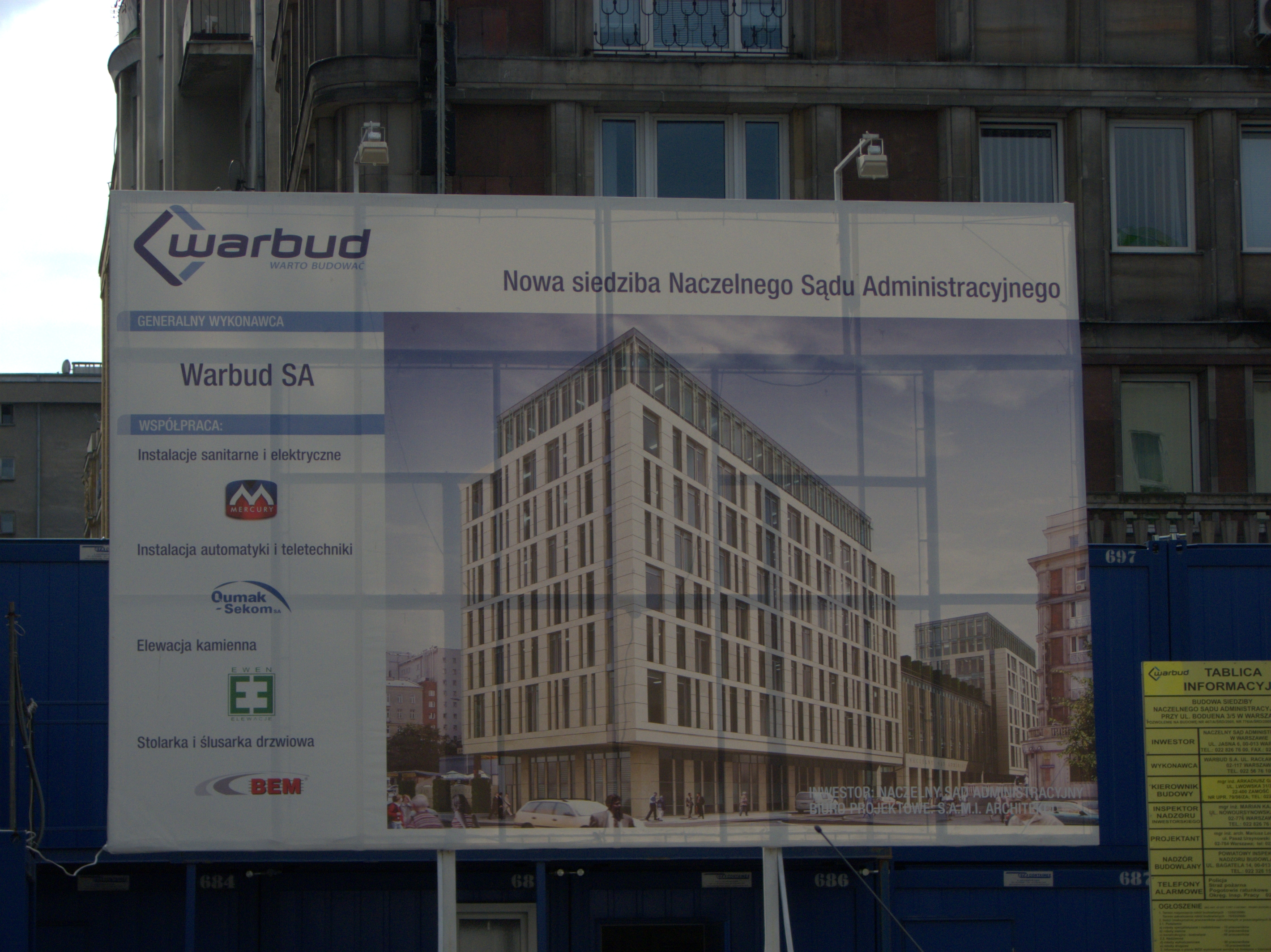 Warbud